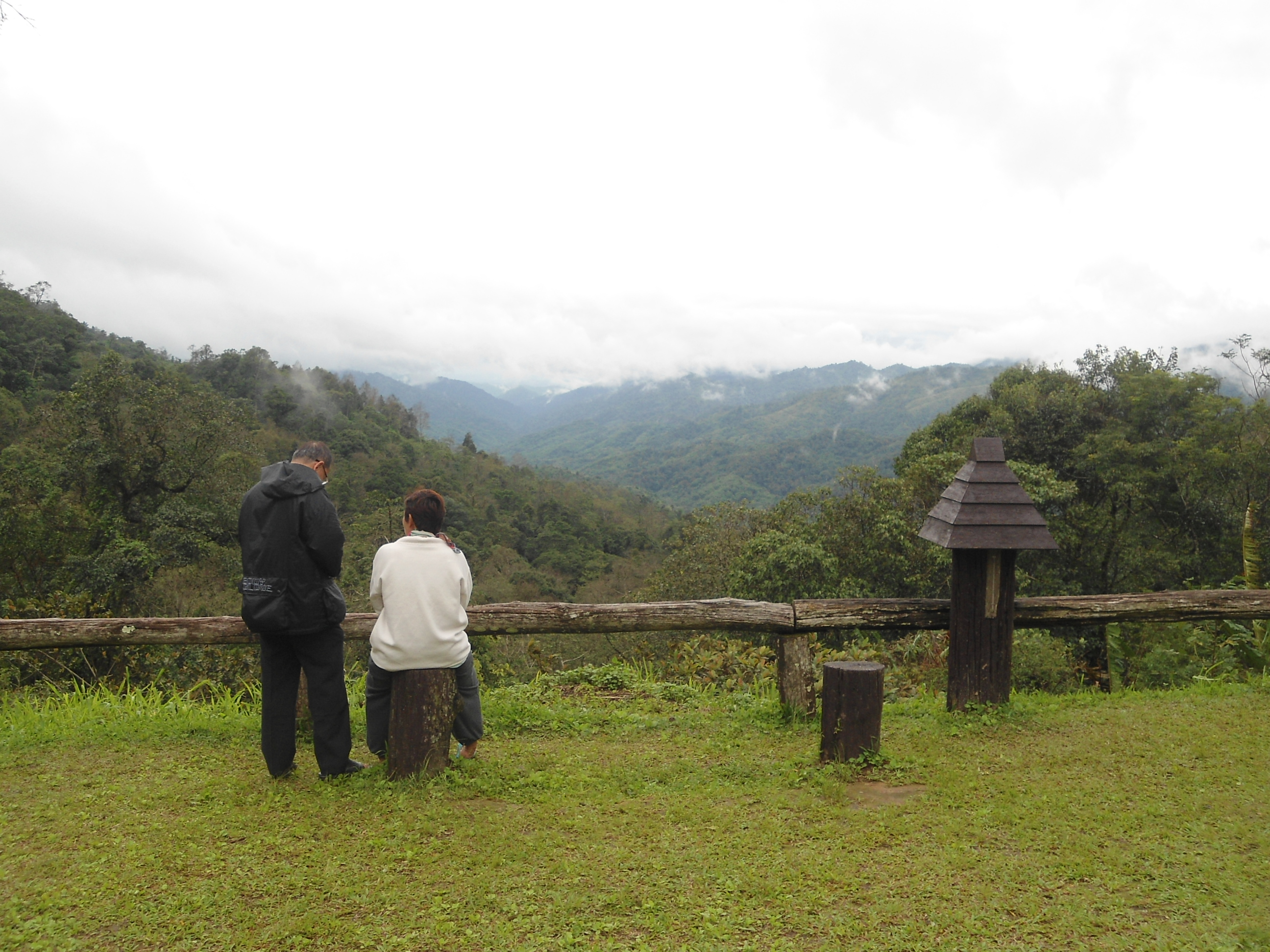 ช่องเย็น อยู่สูงจากระดับน้ำทะเลปานกลาง 1340 เมตรในเขตอุทยานแห่งชาติแม่วงก์ อำเภอปางศิลาทอง จังหวัดกำแพงเพชร มีอากาศหนาวเย็นตลอดทั้งปี อุณหภูมิเฉลี่ยไม่เกิน 20 องศาเซลเซียส